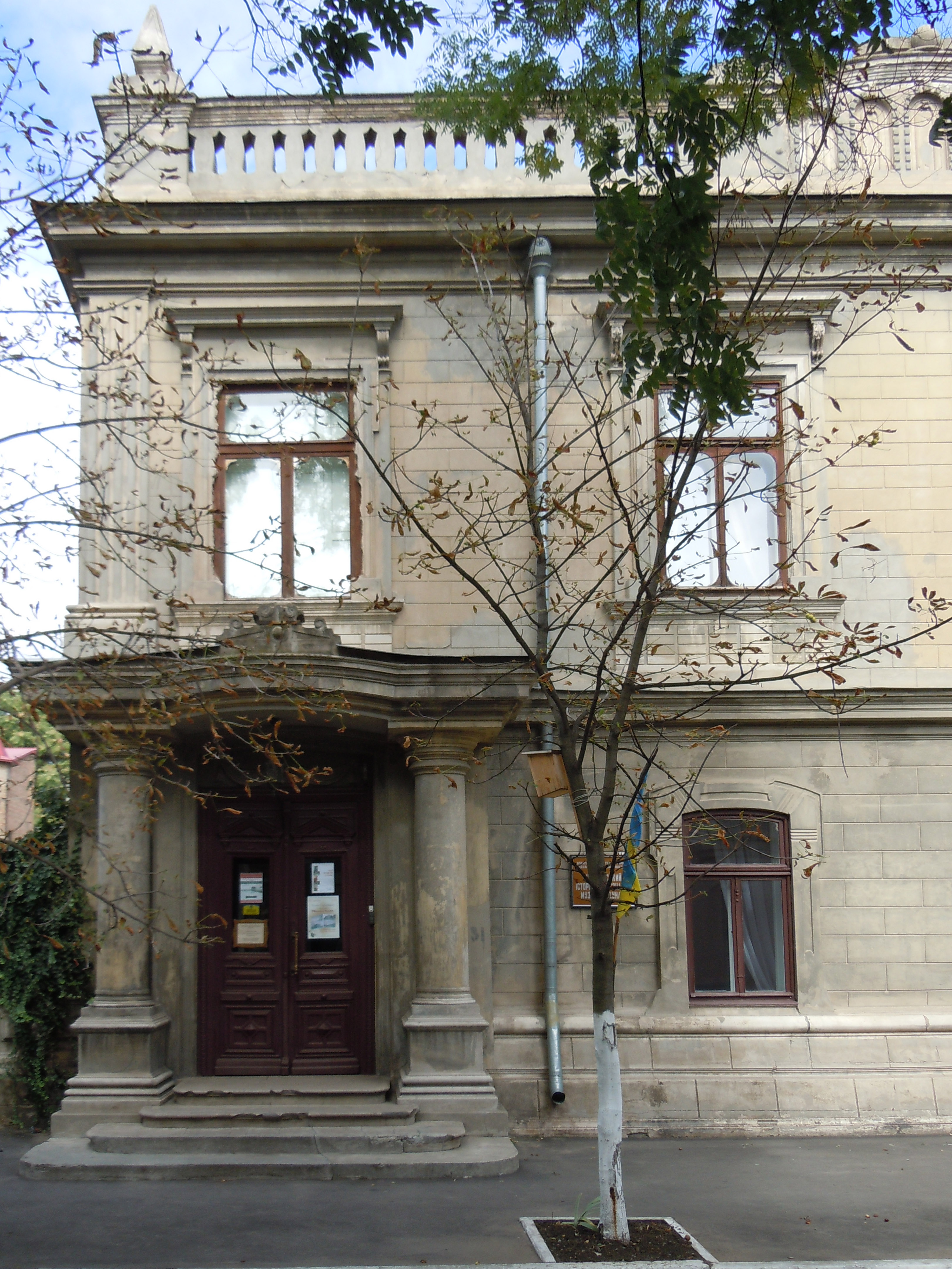 Особняк Тульчіанова (з дворовим флігелем), Ізмаїл, Котовського вул., 51 ріг Суворова просп.